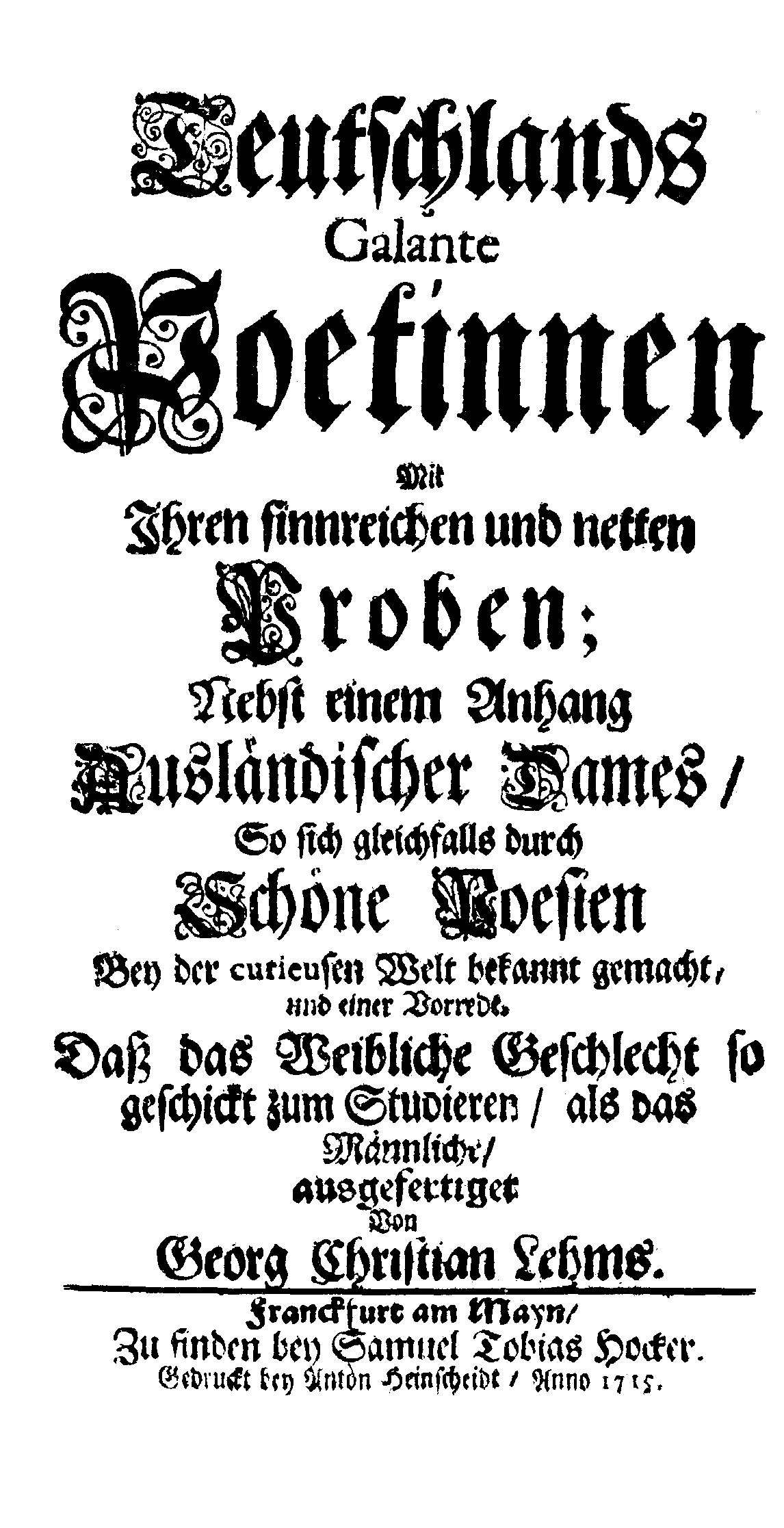 de: Dies ist ein Scan des Buches: en: This is a scan of the book: Teutschlands Galante Poetinnen Mit Ihren sinnreichen und netten Proben; Nebst einem Anhang Ausländischer Dames / So sich gleichfalls durch Schöne Poesien Bey der curieusen Welt bekannt gemacht, und einer Vorrede. Daß das Weibliche Geschlecht so geschickt zum Studieren / als das Männliche / ausgefertiget Von Georg Christian Lehms., Franckfurt am Mayn / Zu finden bey Samuel Tobias Hocker. Gedruckt bey Anton Heinscheidt / Anno 1715. Inhalt: Titel / Widmung Vorrede Teutschlands Galante Poetinnen Anhang Ausländischer Poetinnen